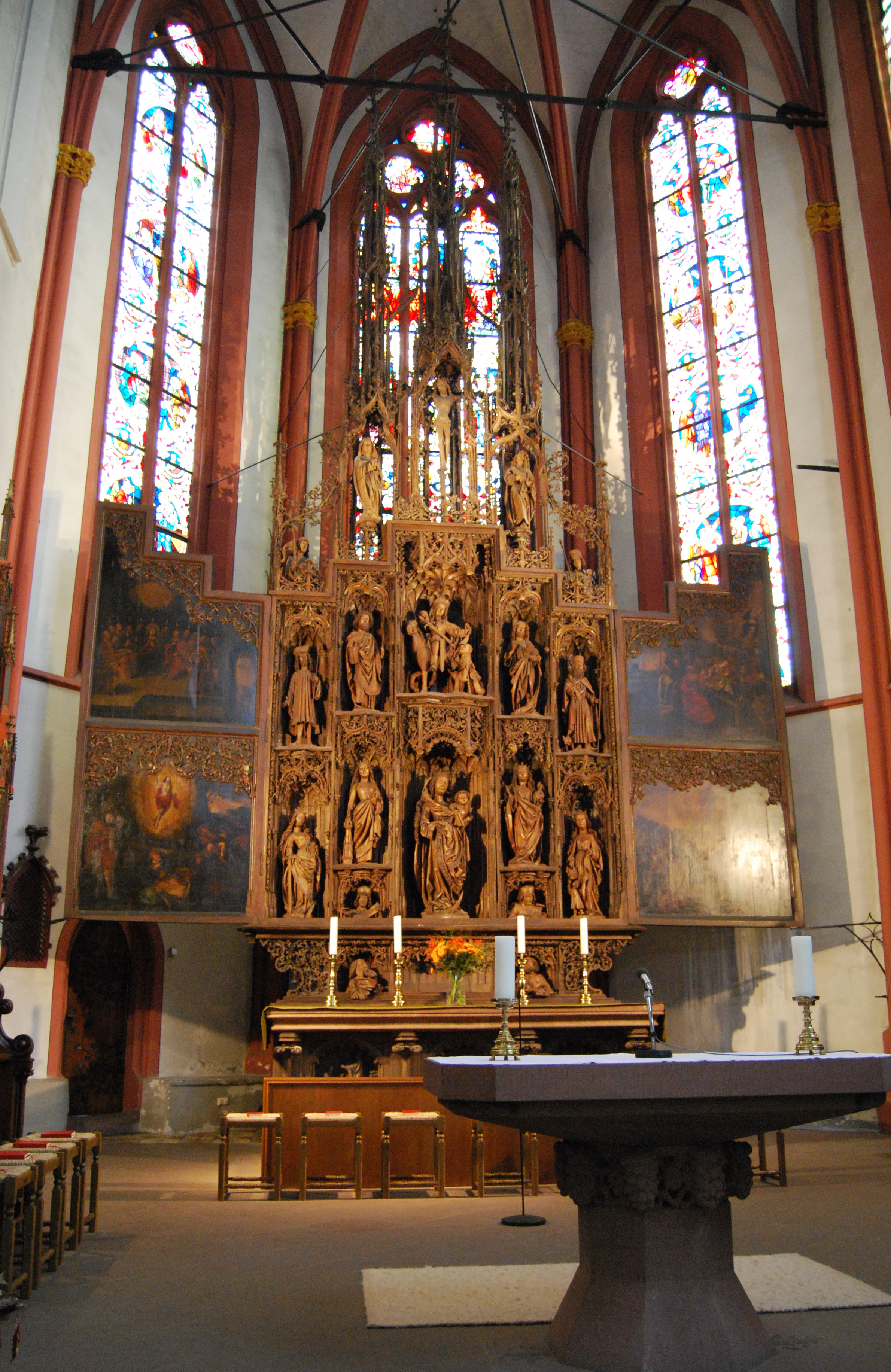 Hochaltar der katholischen Pfarrkirche St. Martin, Lorch, Rheingau